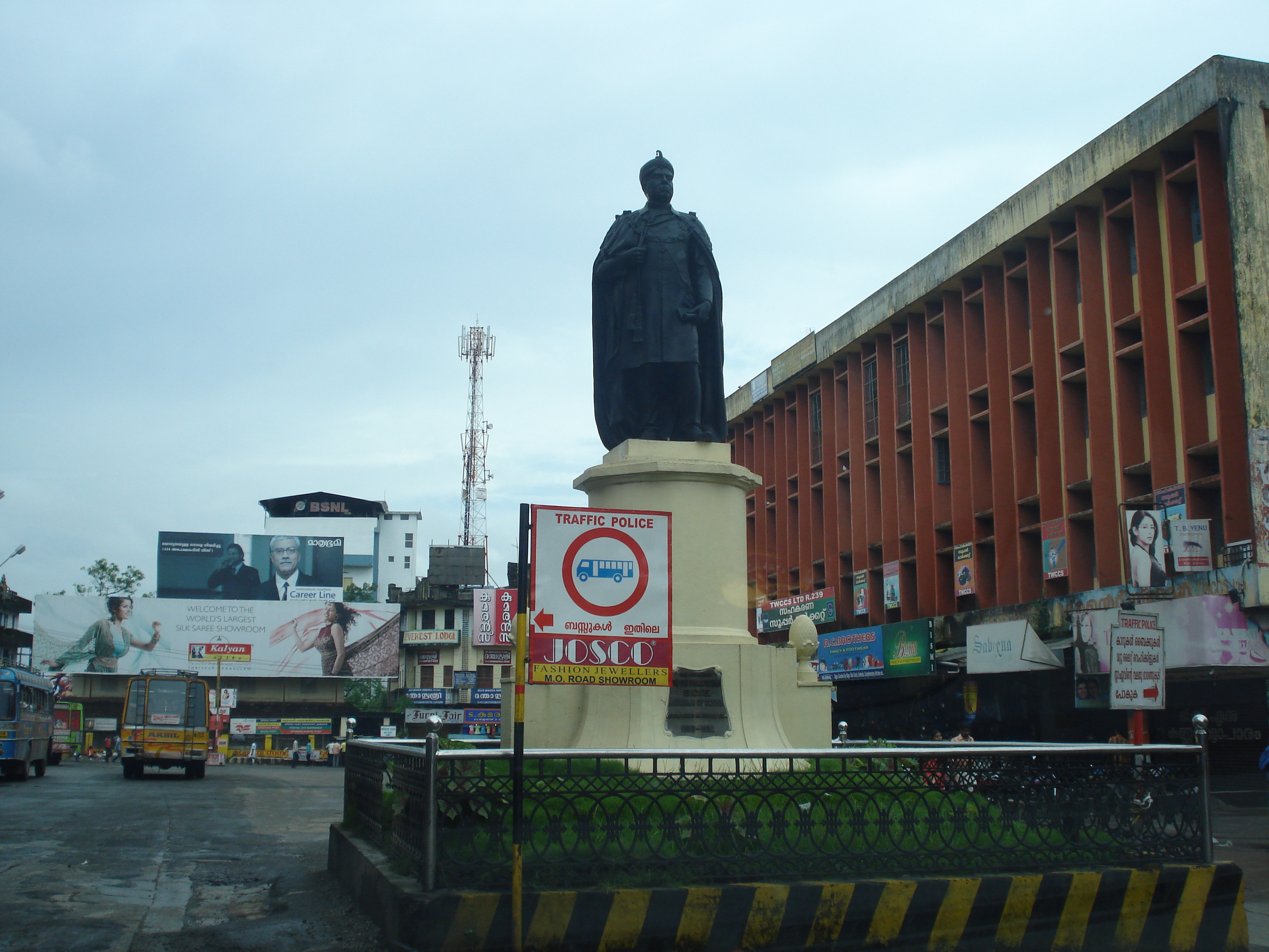 Ramavarma Thampuran statue near Municipal bus stand, Thrissur